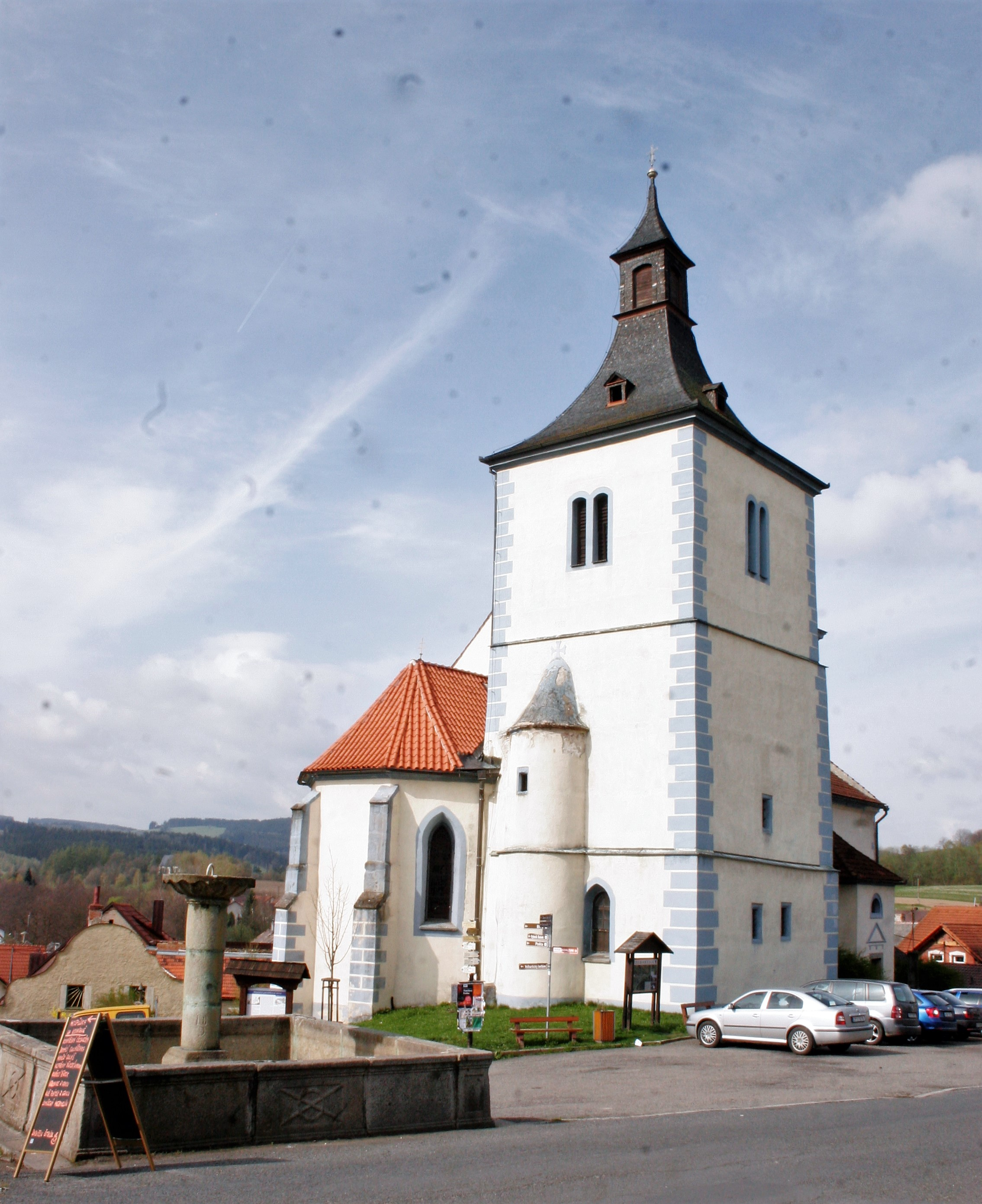 Velhartice. Okres Klatovy, Česká republika.